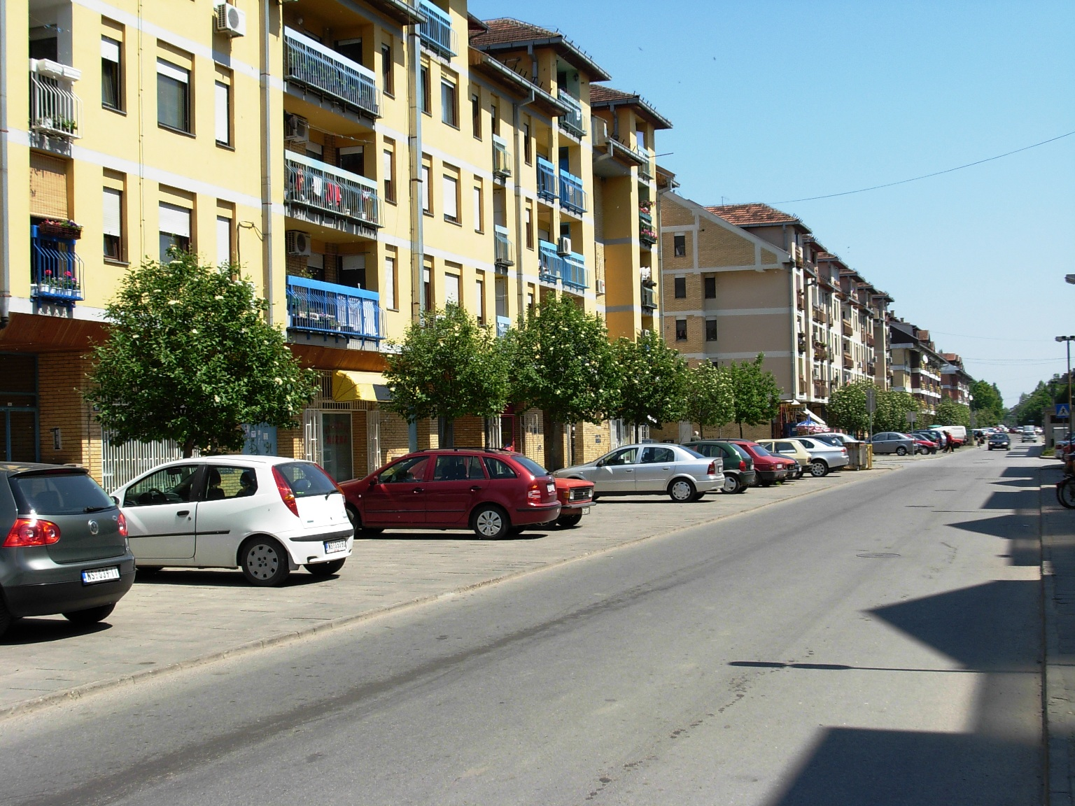 Ulica Mileve Marić u Novom Sadu.